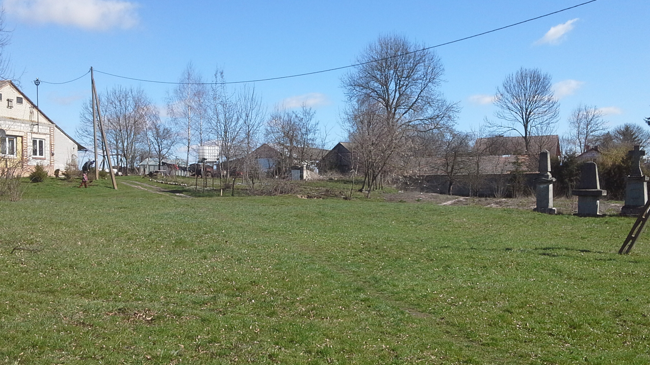 Miejsce po cerkwi w Peresołowicach, teren dawnego cmentarza unickiego